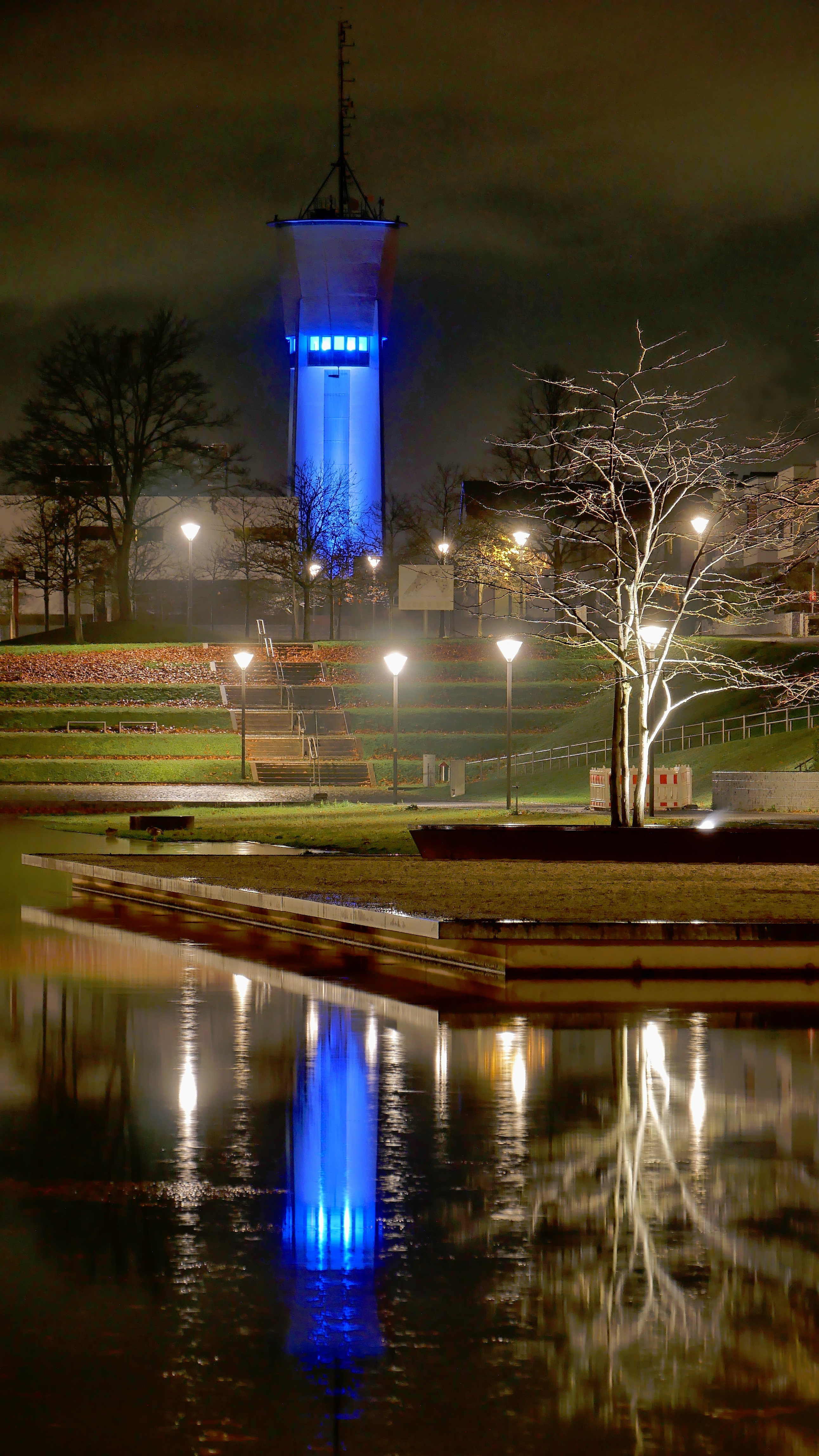 Wasserband auf dem Petrisberg in Trier. Darüber (und darin gespiegelt)